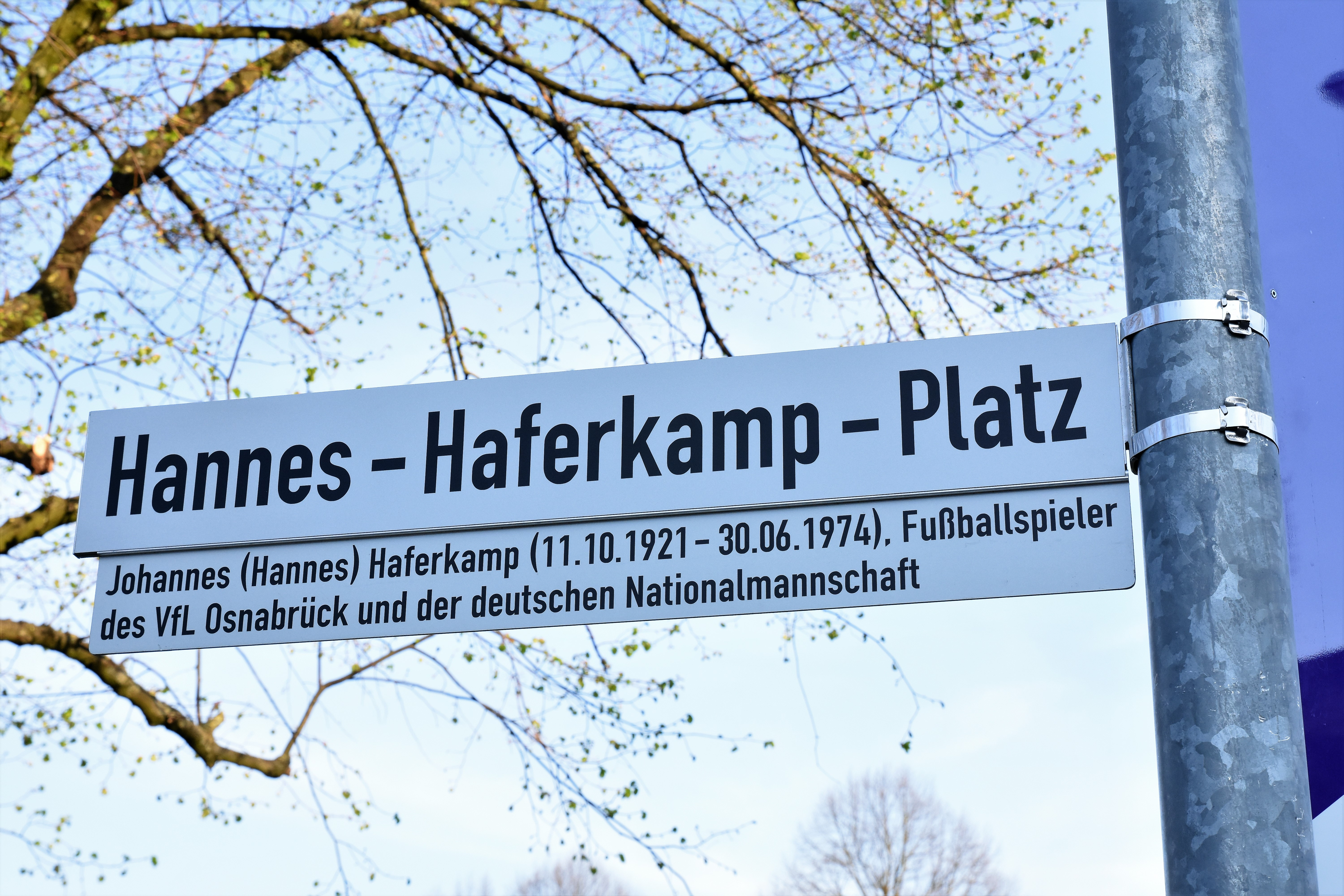 Hannes-Haferkamp-Platz vor dem Stadion an der Bremer-Brücke